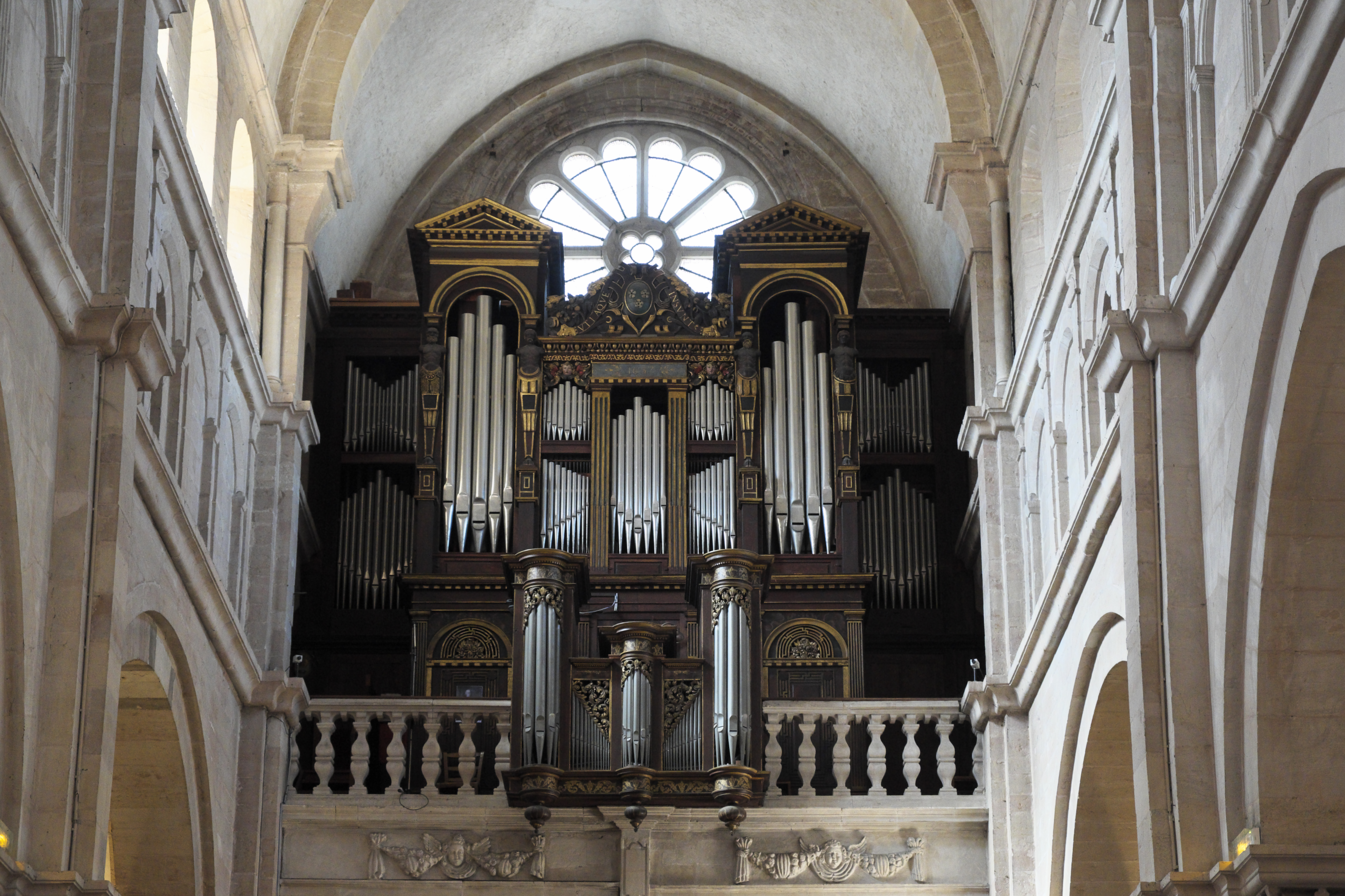 Katholische Pfarrkirche, ehemalige Stiftskirche, Notre-Dame in Beaune im Département Côte-d’Or (Bourgogne-Franche-Comté/Frankreich), Orgel This object is classé Monument Historique in the base Palissy, database of the French furniture patrimony of the French ministry of culture, under the references PM21000211, PM21003095 and PM21003096.